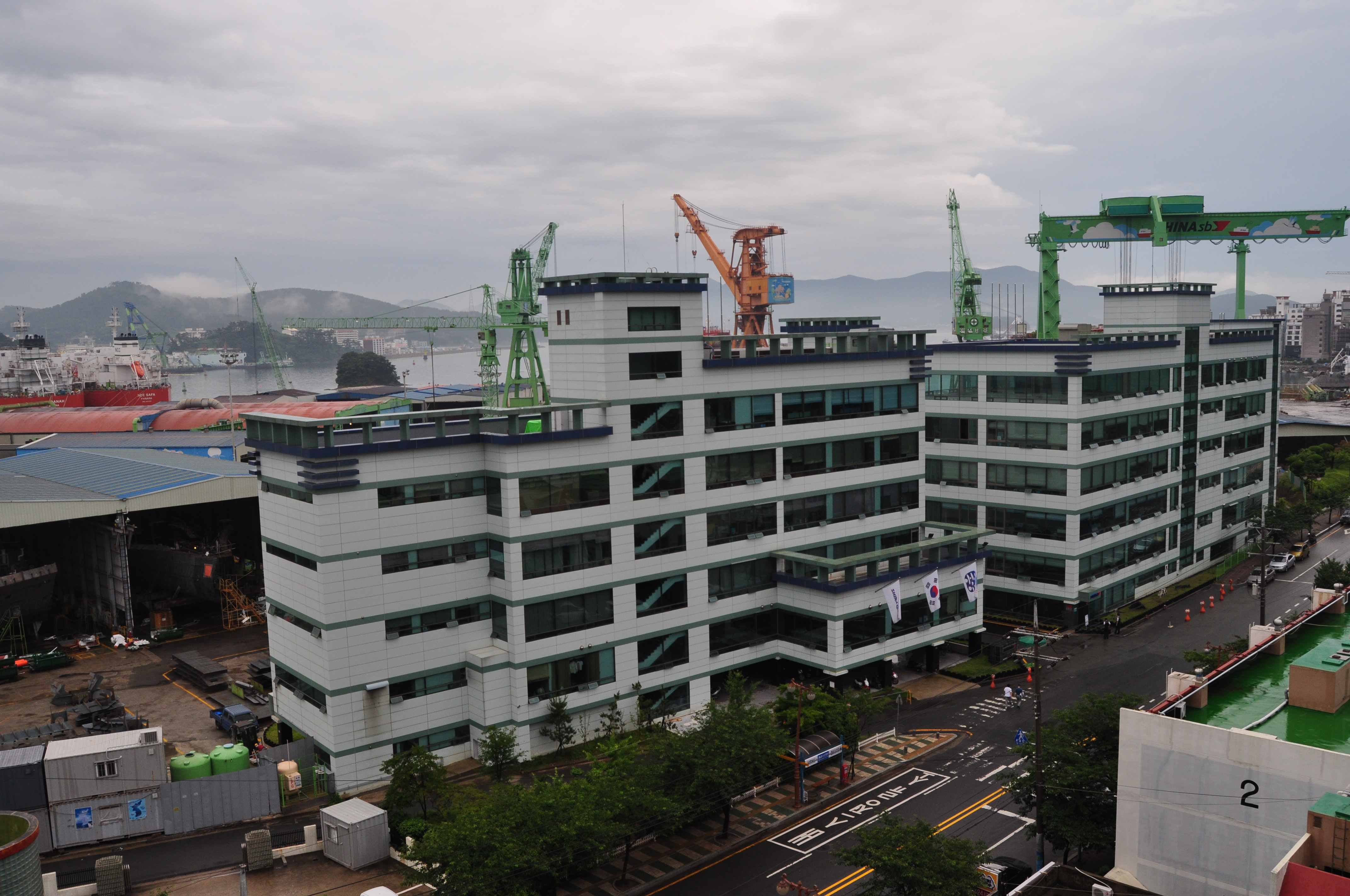 (주)신아에스비 본사 전경. 대한민국 경남 통영시 도남동 227번지 소재.